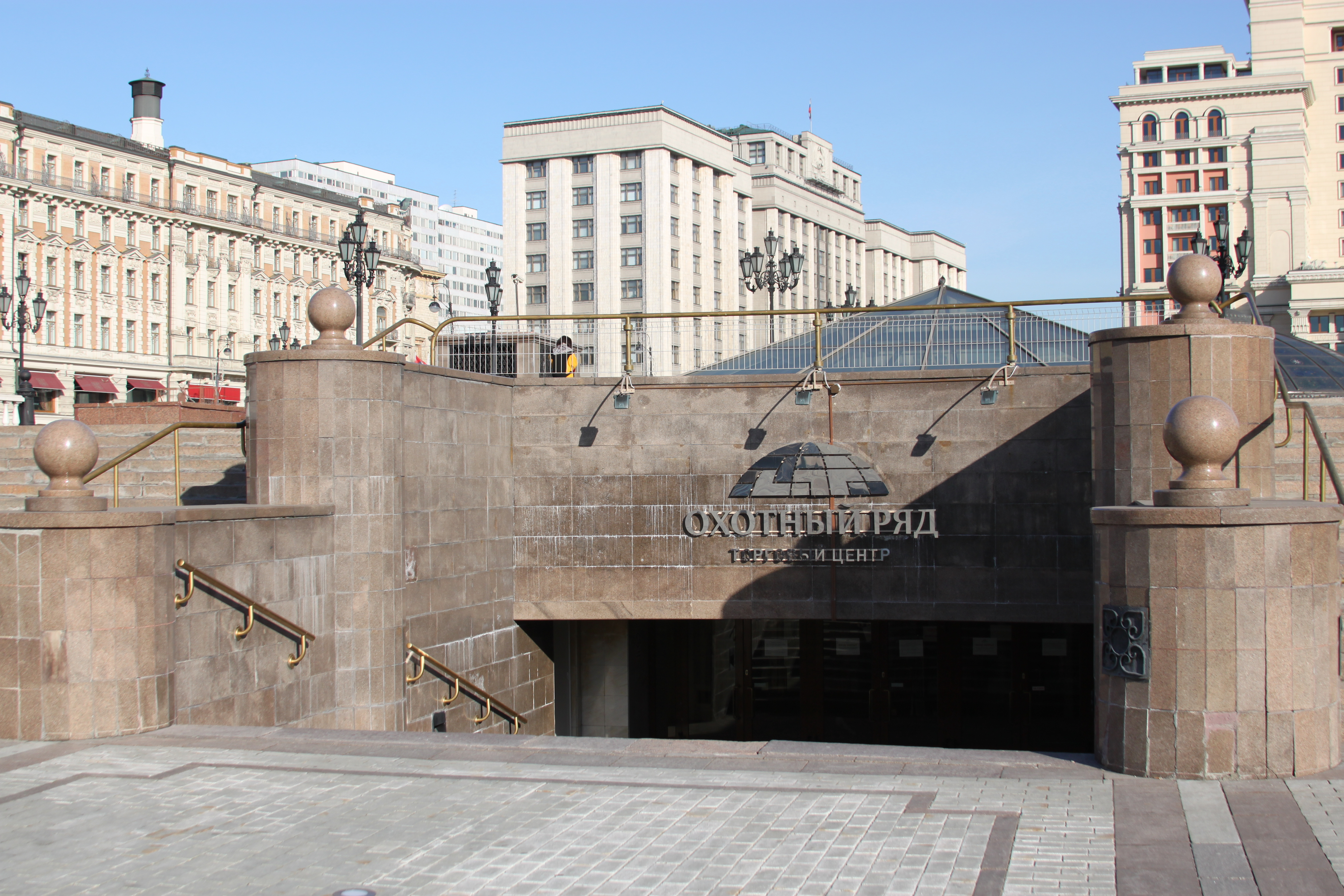 2014 Moscow Okhotny Ryad store Москва. Охотный ряд. Торговый центр "Охотный ряд"